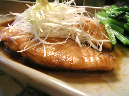 teriyaki sea bream